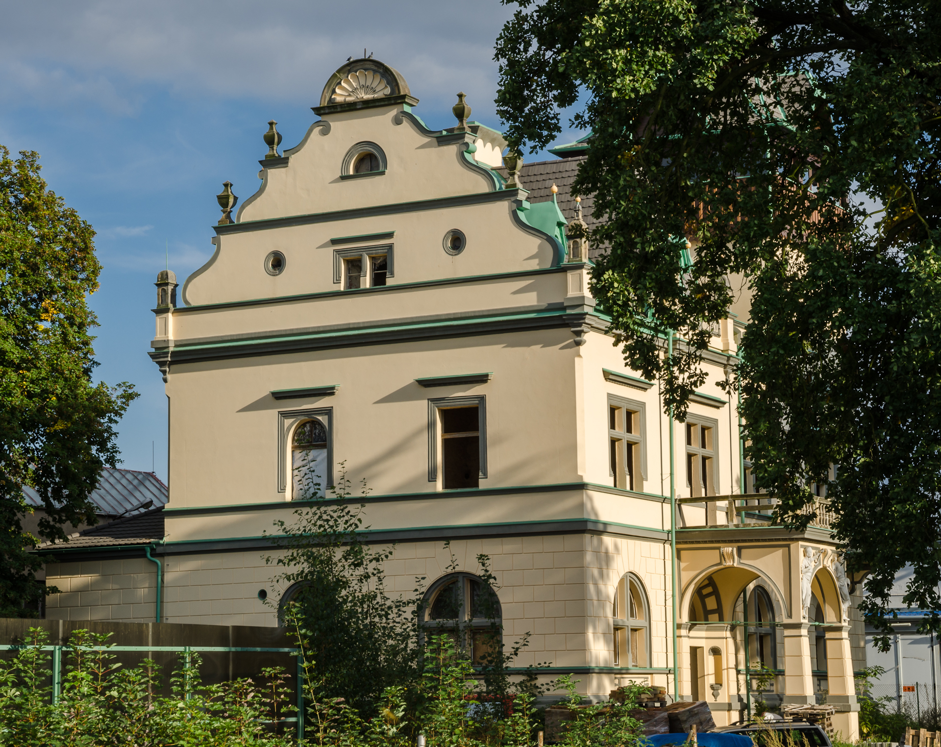 Vila Vosáhlova (Dašice), Jungmannova ul. 31, Dašice